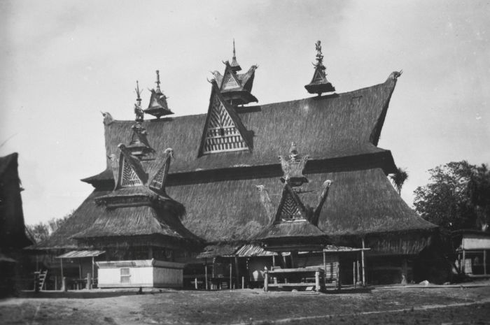 Foto. Het wooncomplex van Pa Mbelga met schedelhuis (geriten) en duiventil te Kabandjahe